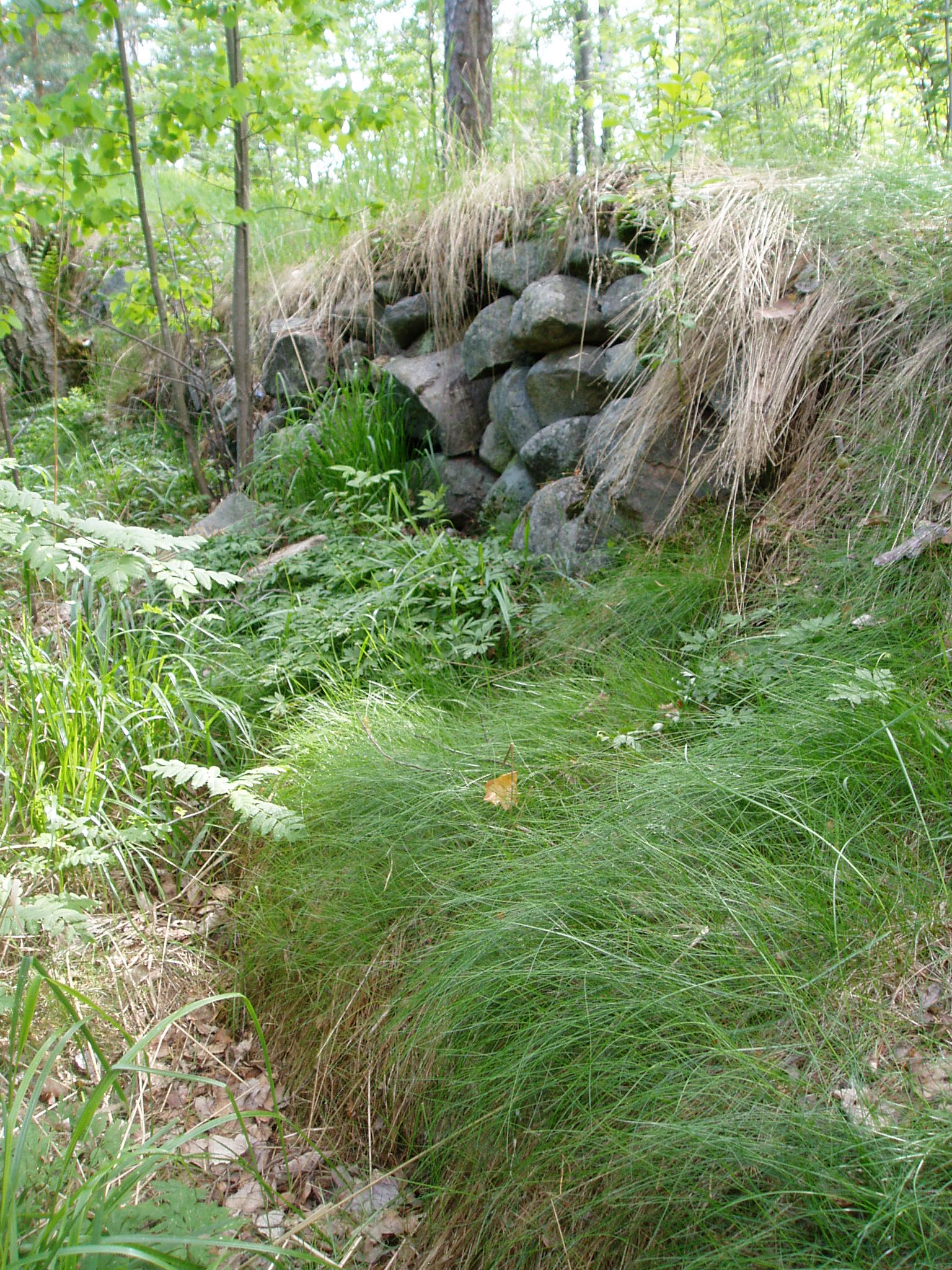 Krepost Sveaborg. Photo by Ohto Kokko.